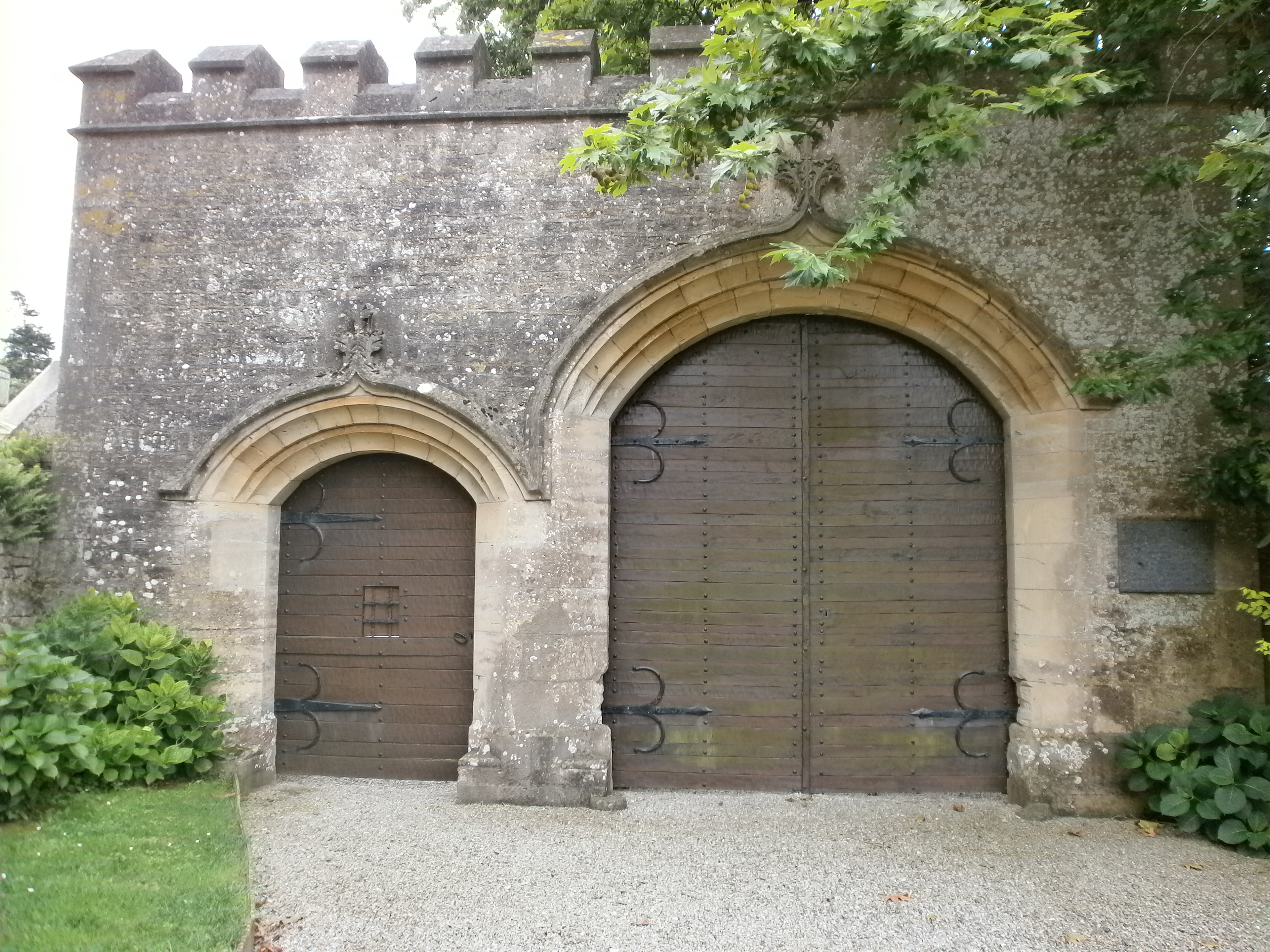 Yvetot-Bocage - Château de Servigny, portail